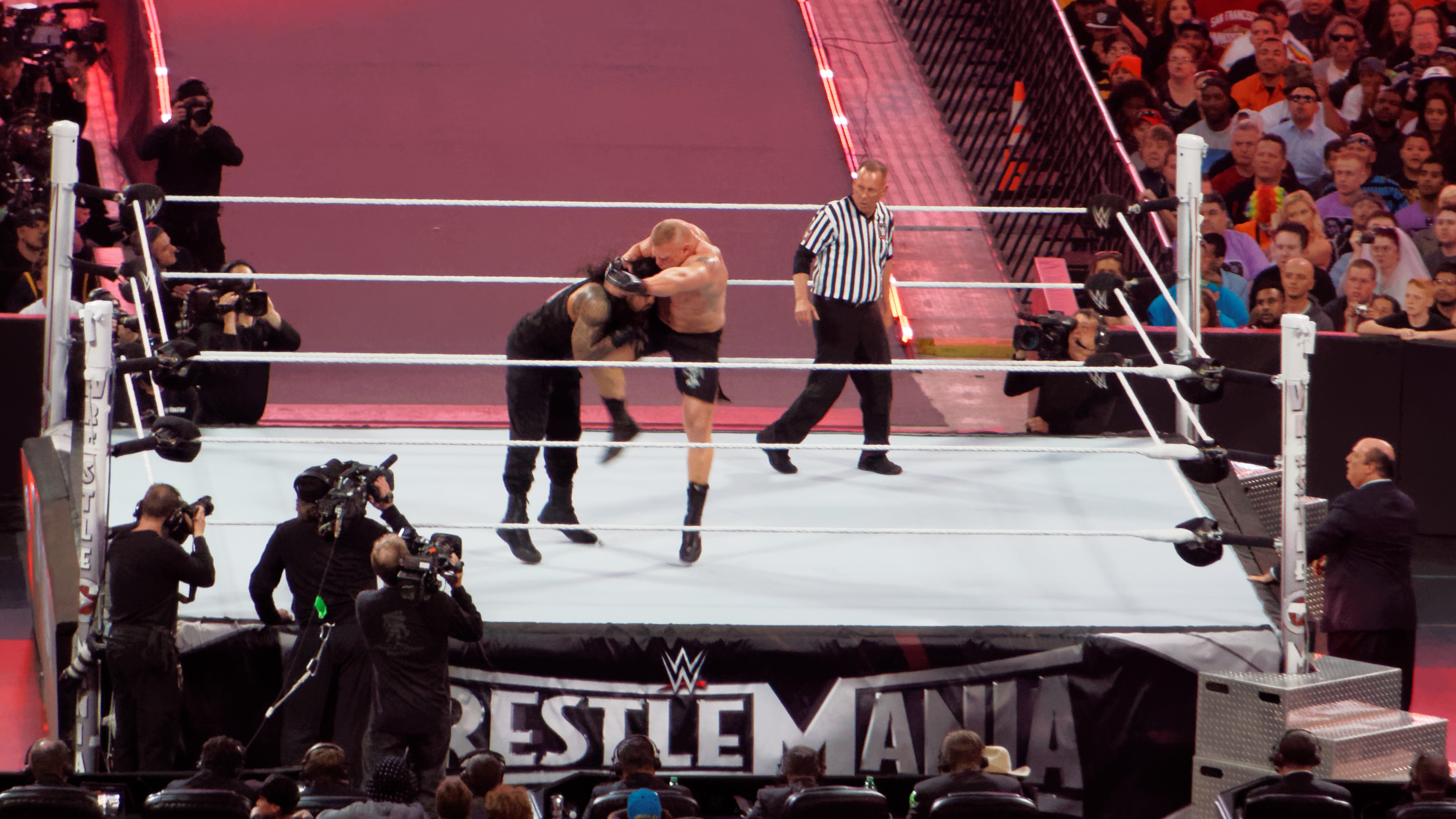 2015-03-29_19-43-42_ILCE-6000_9787_DxO